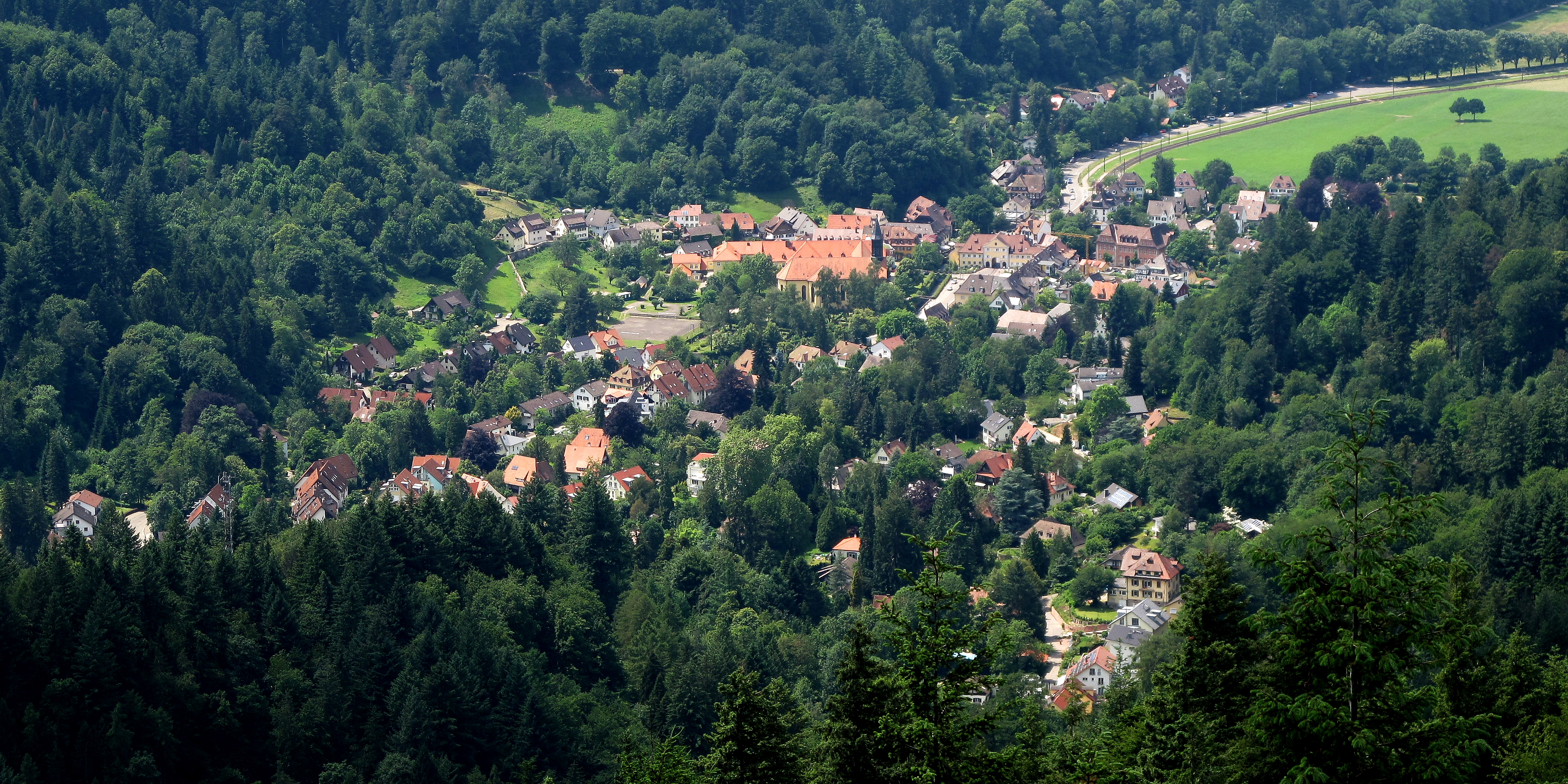 Günterstal aus der Vogelflugperspektive - Ausblick vom ca. 1,5 km entfernten Standort des einstigen Südturms auf dem Kibfelsen.